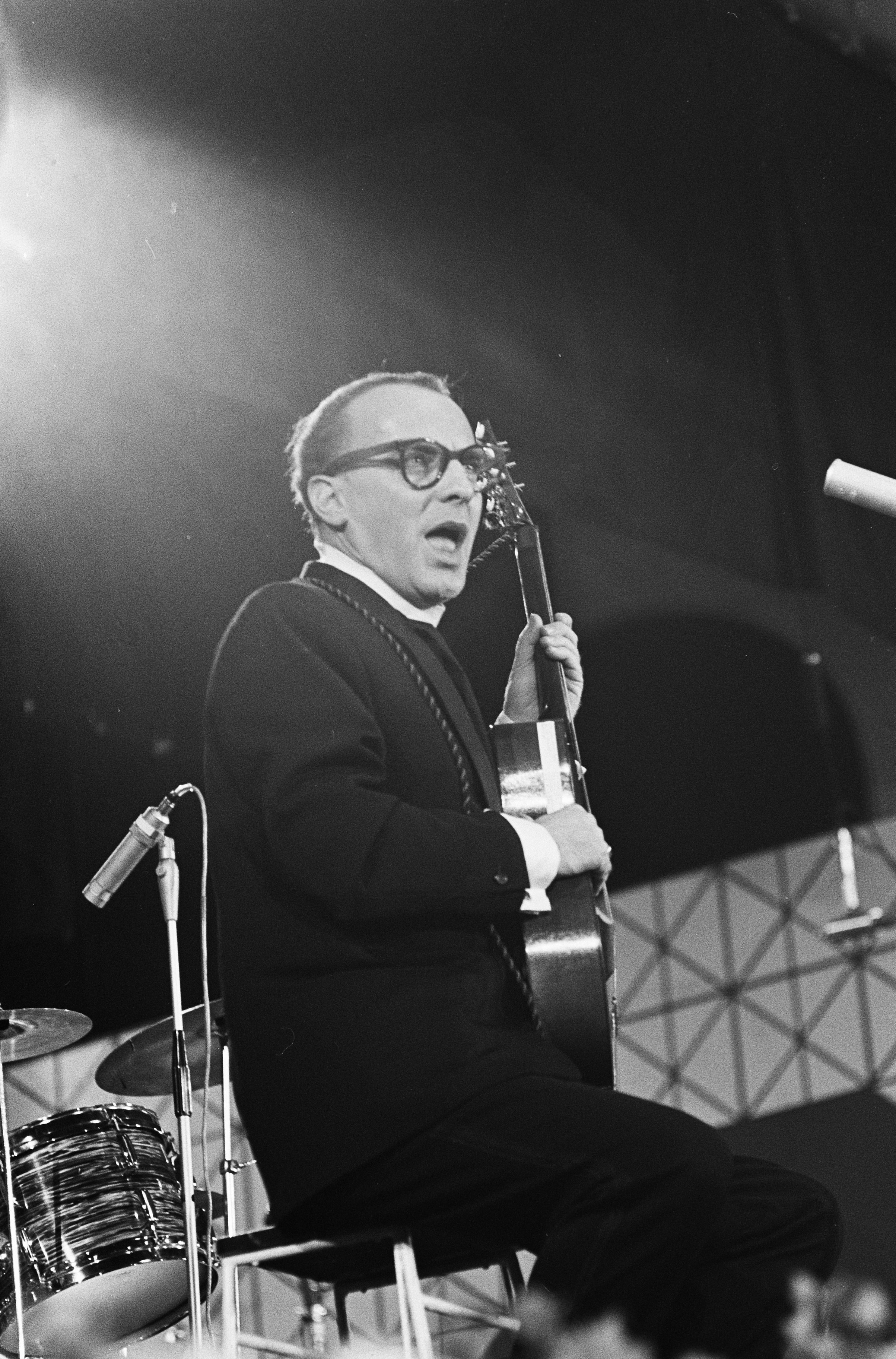 Collectie / Archief : Fotocollectie Anefo Reportage / Serie : [ onbekend ] Beschrijving : Grand Gala du Disque populier in Kurhaus te Scheveningen Wim Sonneveld als de zingende frater Venantius Datum : 13 oktober 1963 Locatie : Scheveningen, Zuid-Holland Persoonsnaam : Sonneveld, Wim Fotograaf : Koch, Eric / Anefo Auteursrechthebbende : Nationaal Archief Materiaalsoort : Negatief (zwart/wit) Nummer archiefinventaris : bekijk toegang 2.24.01.05 Bestanddeelnummer : 915-6256